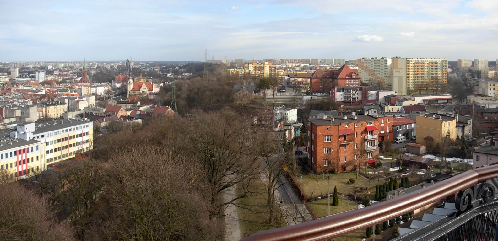 Widok z wieży ciśnień w Bydgoszczy. Po lewej centrum miasta (dolny taras), po prawej fragment Szwederowa (górny taras)